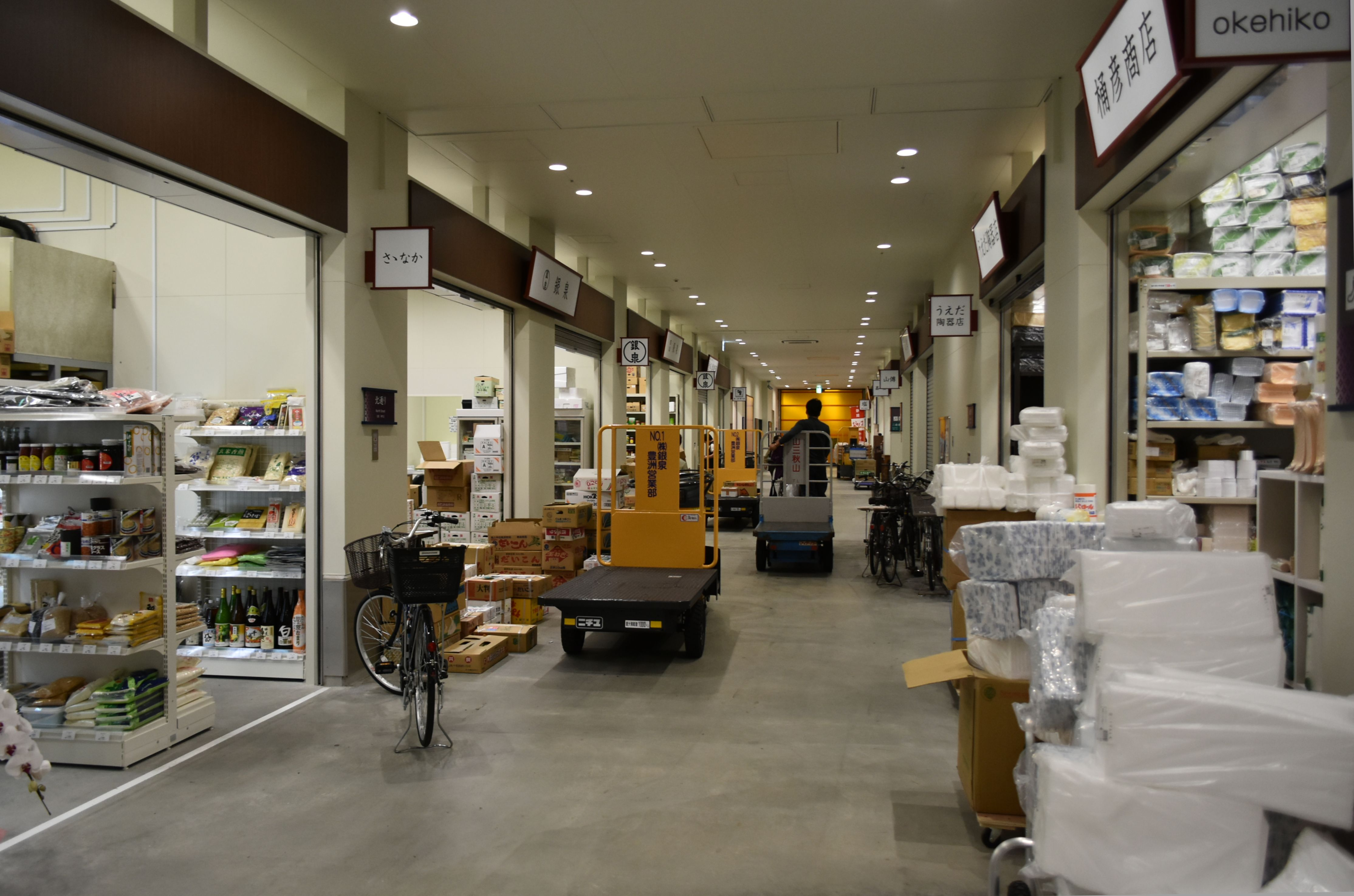 豊洲市場 6街区水産仲卸売場棟 3階店舗